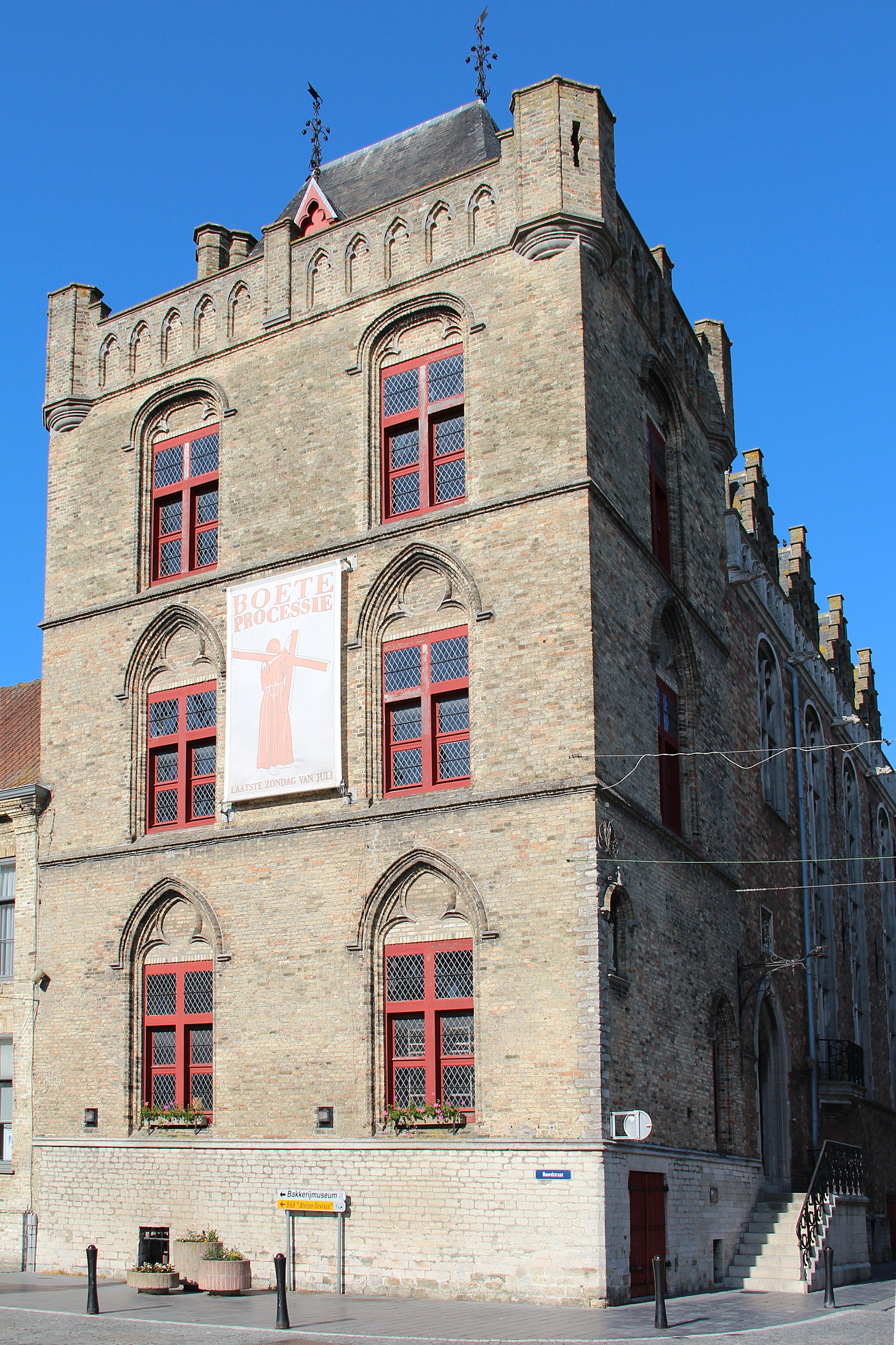 Le "Spaans Paviljoen" de Furnes (Belgique), anciennement hôtel de ville.